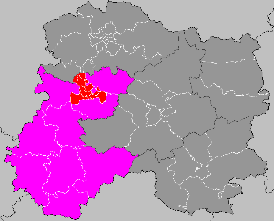 Localisation du canton d'Épernay-2